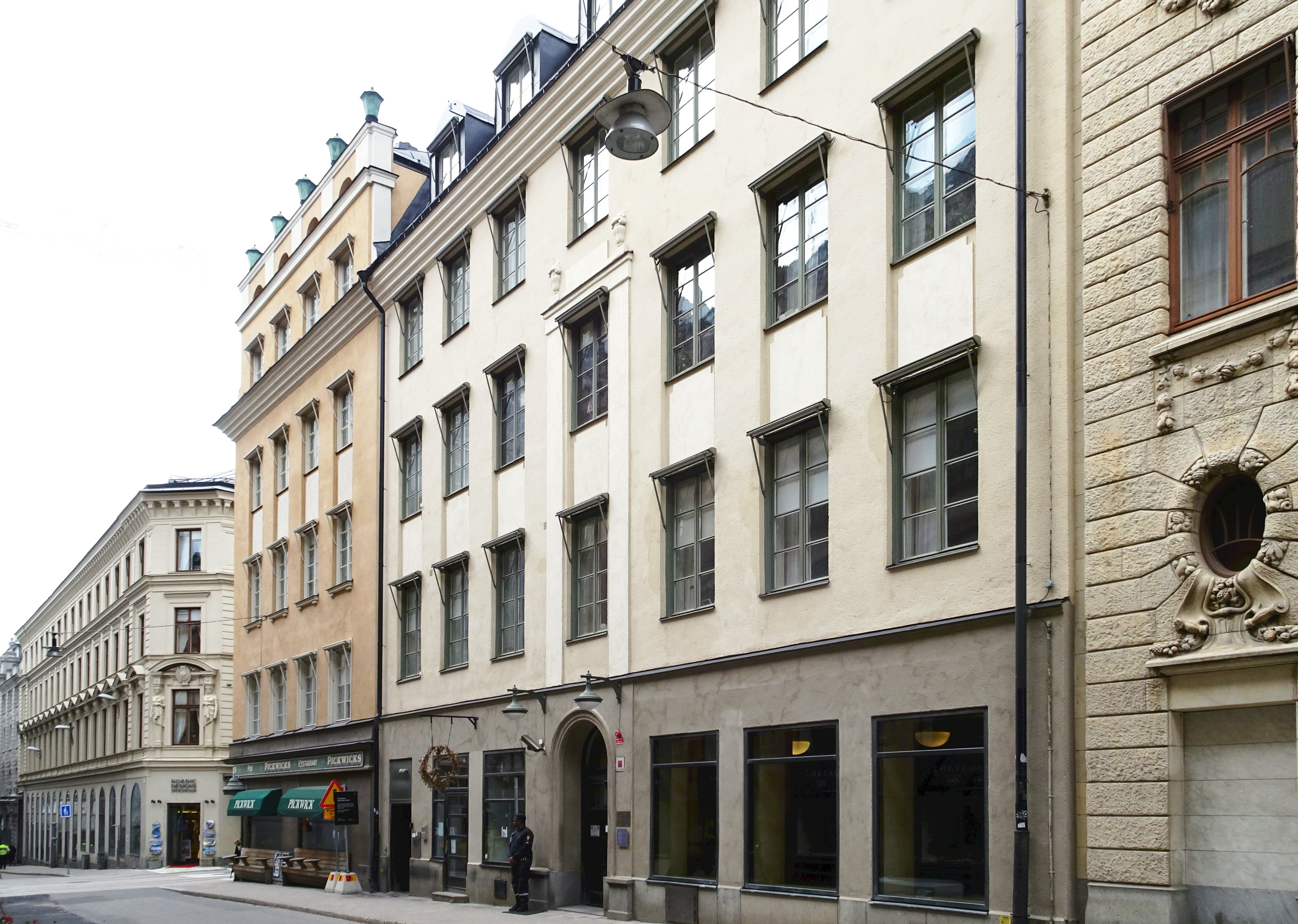 Johannes större 9, Fredsgatan - Drottninggatan, även kallat Sadelmakarens hus